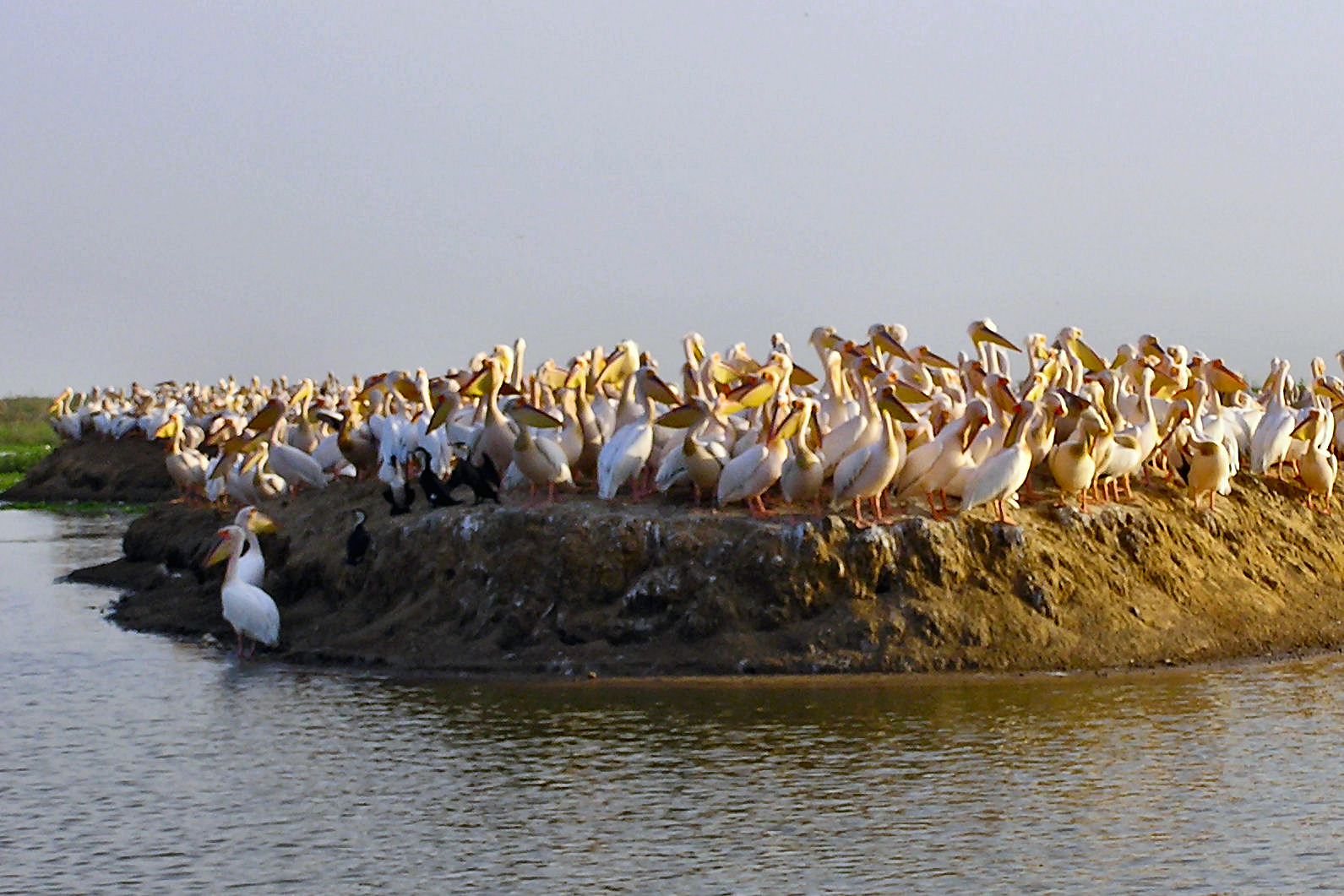 ile ou les pélican se regroupent à Djoudj (Sénégal)